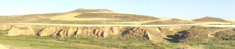 Restos del poblado celta de Borjabudo, en Monteagudo de las Vicarias (Soria).